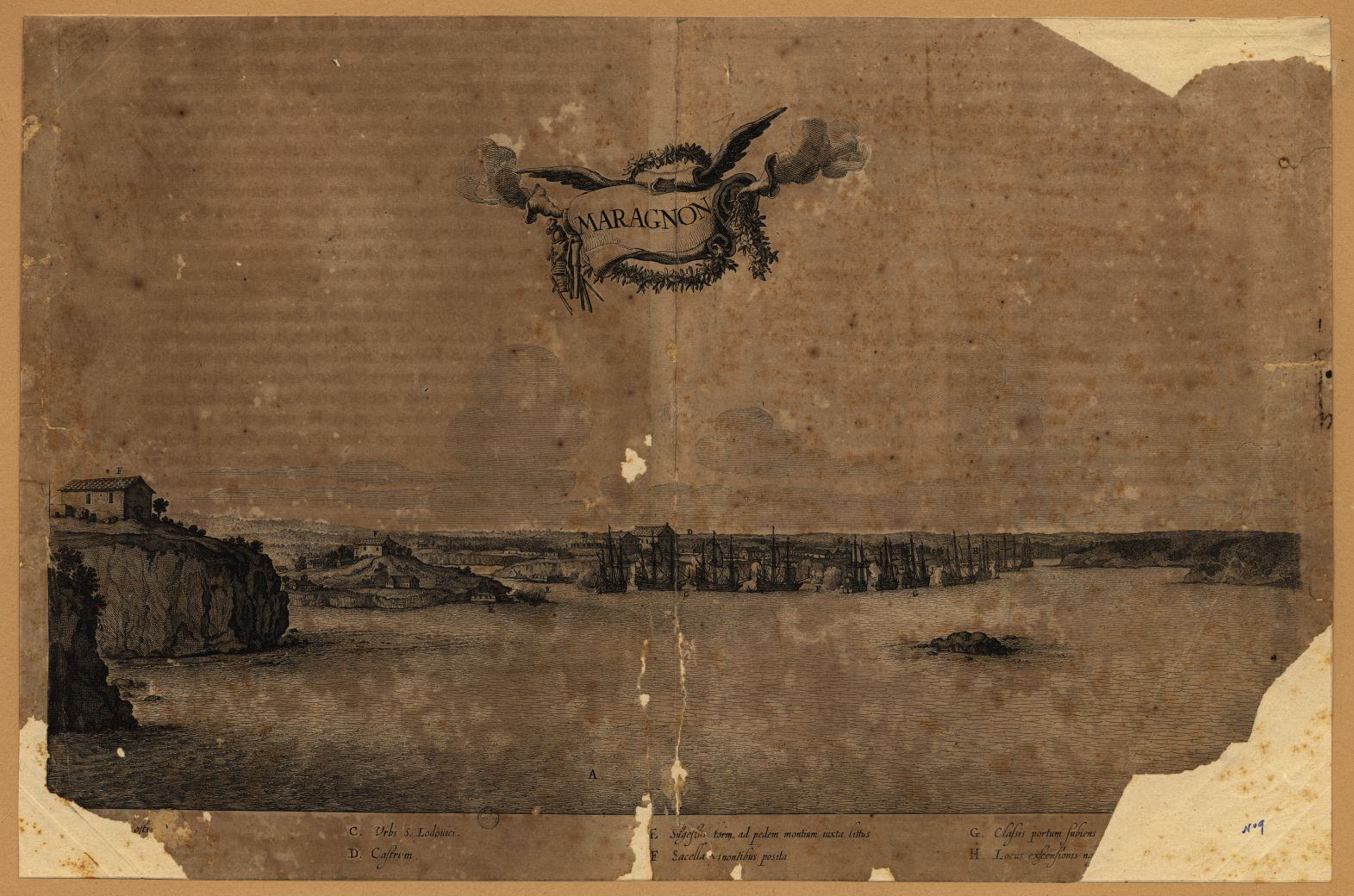 Antigo cartão postal do Maranhão